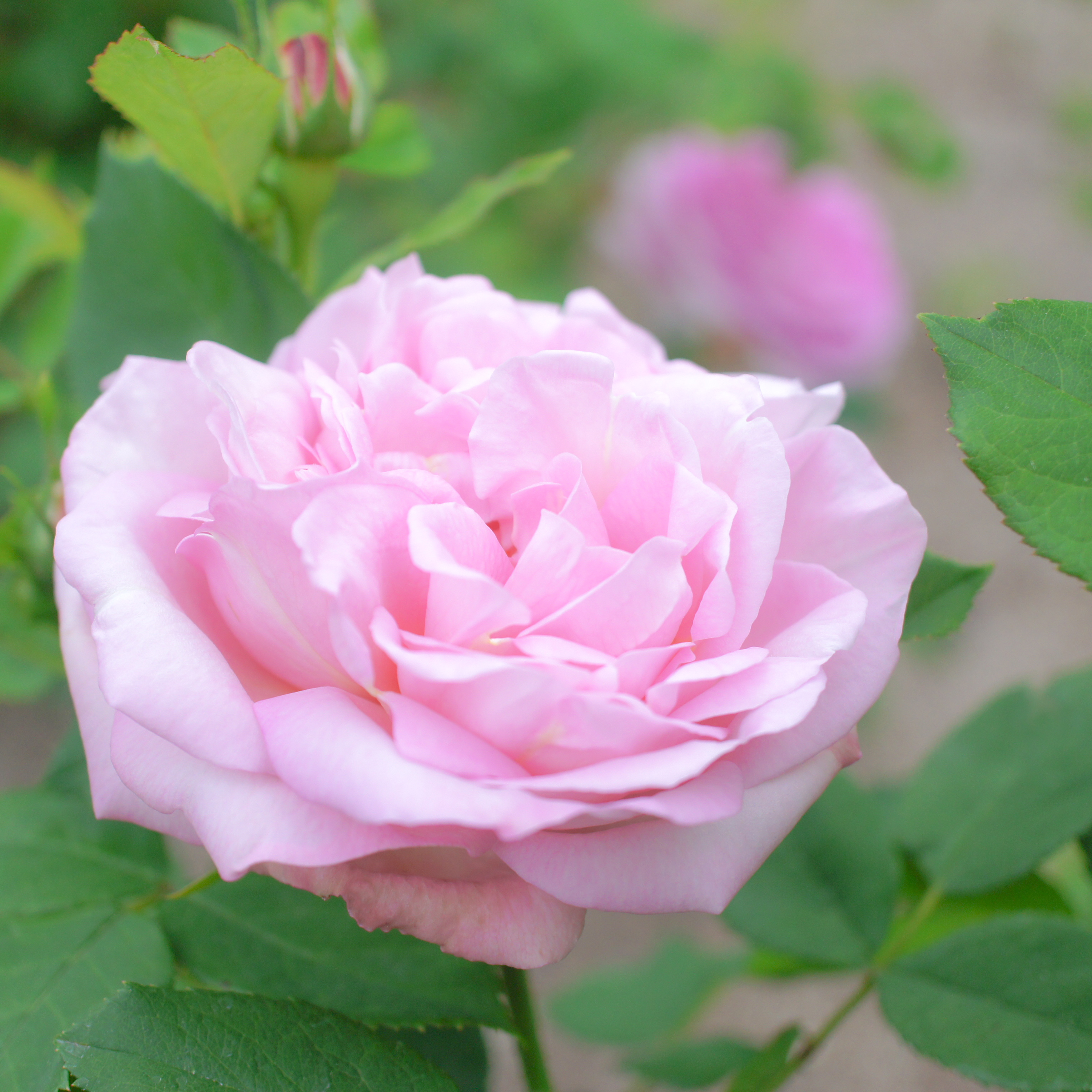 Rose, Anna Scharsach, バラ, アンナ シャルサック, Old rose(HP) オールドローズ Hungary ハンガリー Geschwind 1890